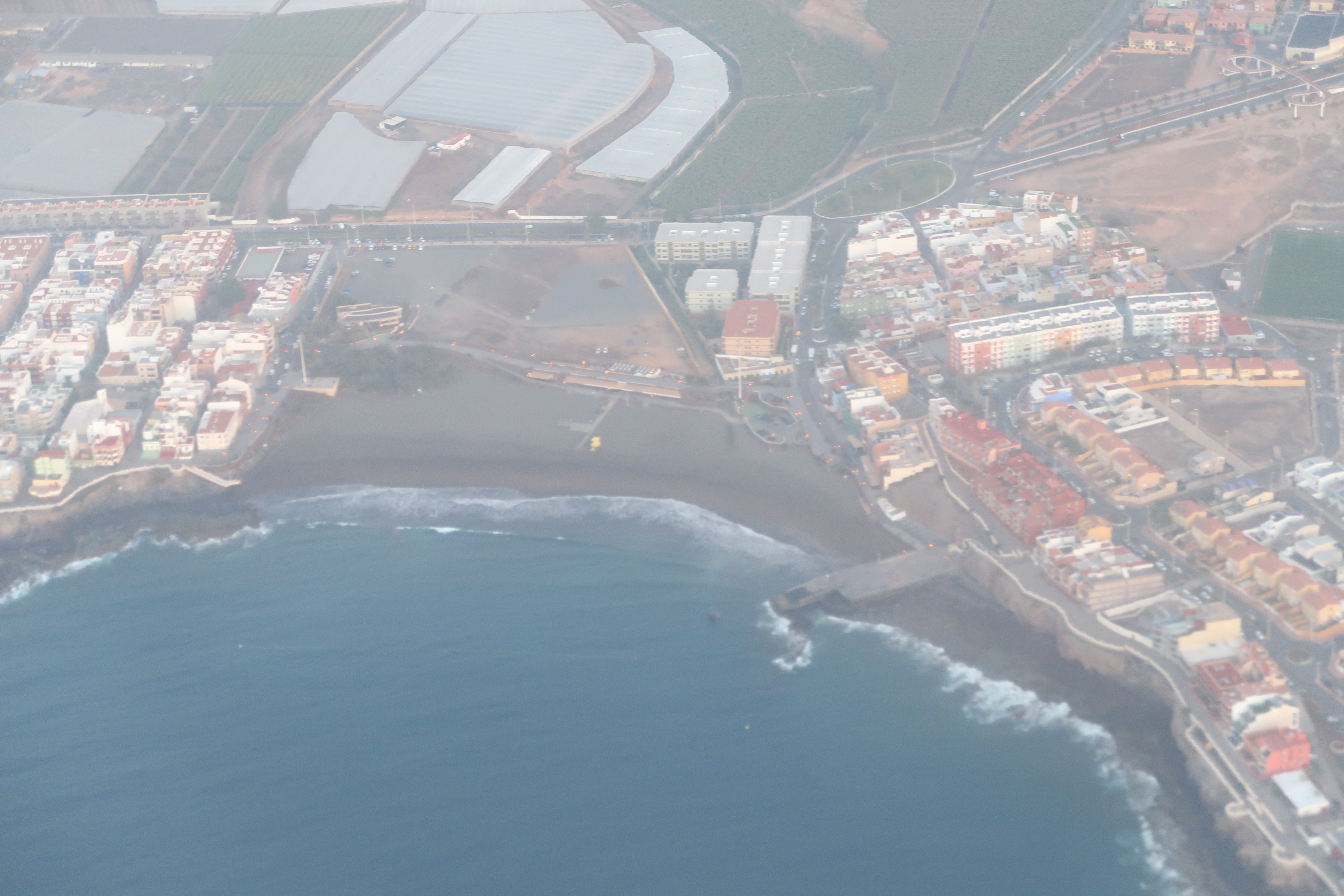 vista aérea de la playa y parte de la localidad